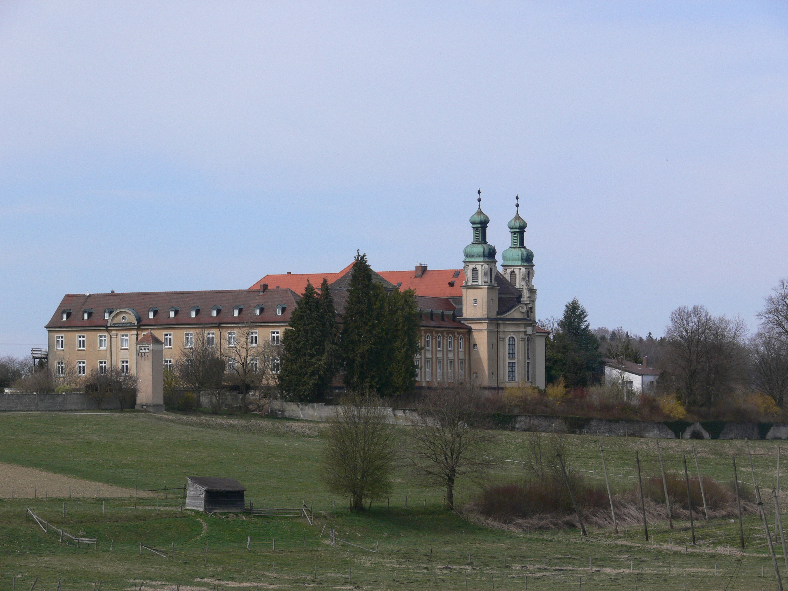 Abtei St. Erentraud, Kellenried, 88276 Berg, Landkreis Ravensburg